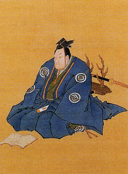 肥後佐賀藩藩儒・古賀侗庵の肖像画。